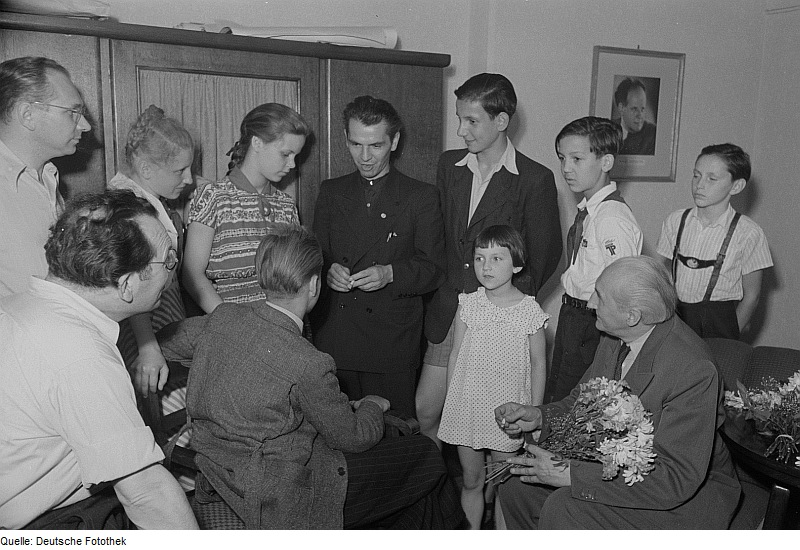 Original image description from the Deutsche Fotothek Hermann Werner Kubsch (Mitte) und Edgar Bennert (rechts) mit Kinderdarstellern